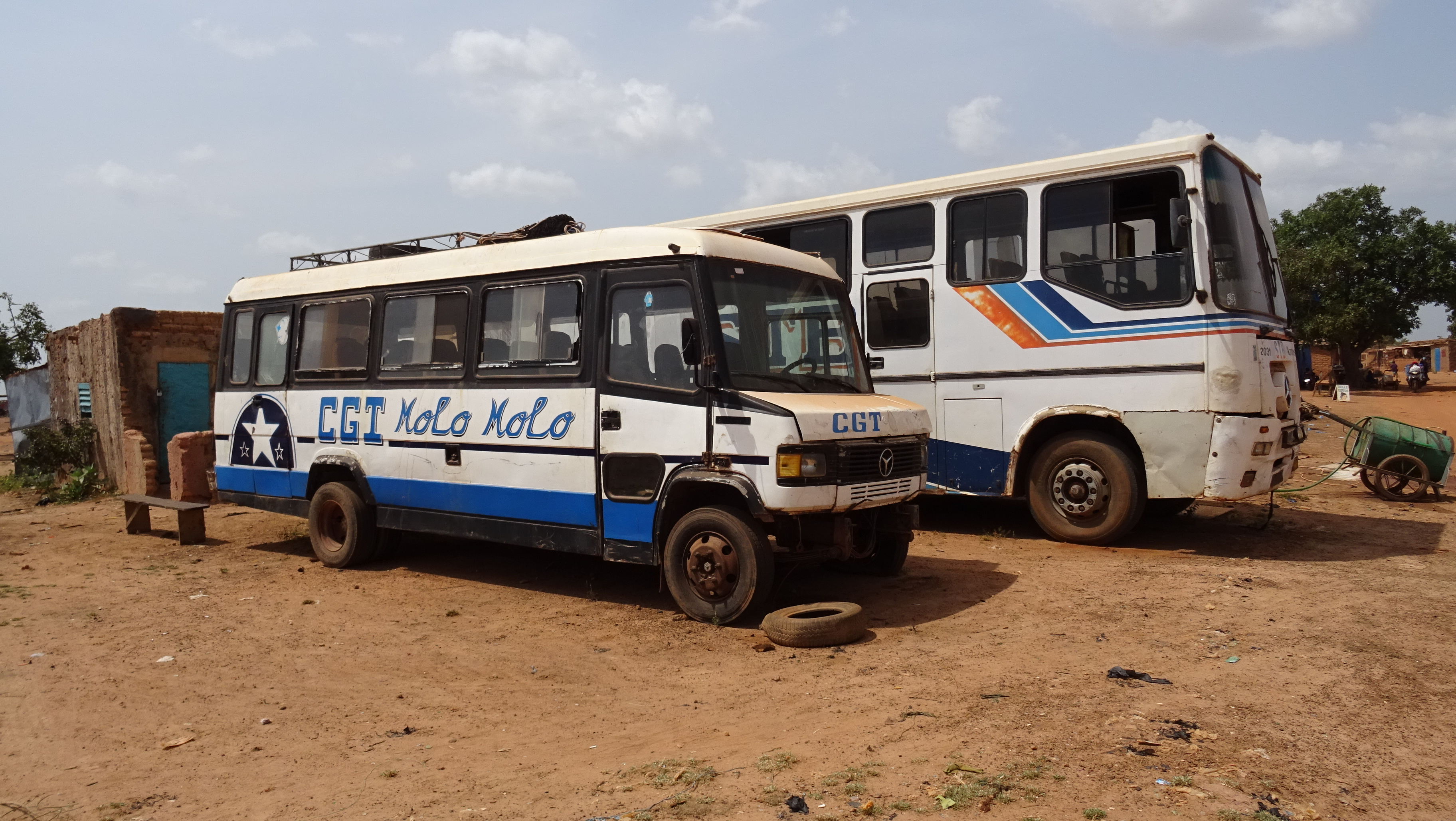 Ouagadougou - Bus et minibus "CGT Molo Molo" N.B. : Les Français comprendrons la pertinence de cette suite de mots. This is an image with the theme "Africa on the Move or Transport" from: Burkina Faso